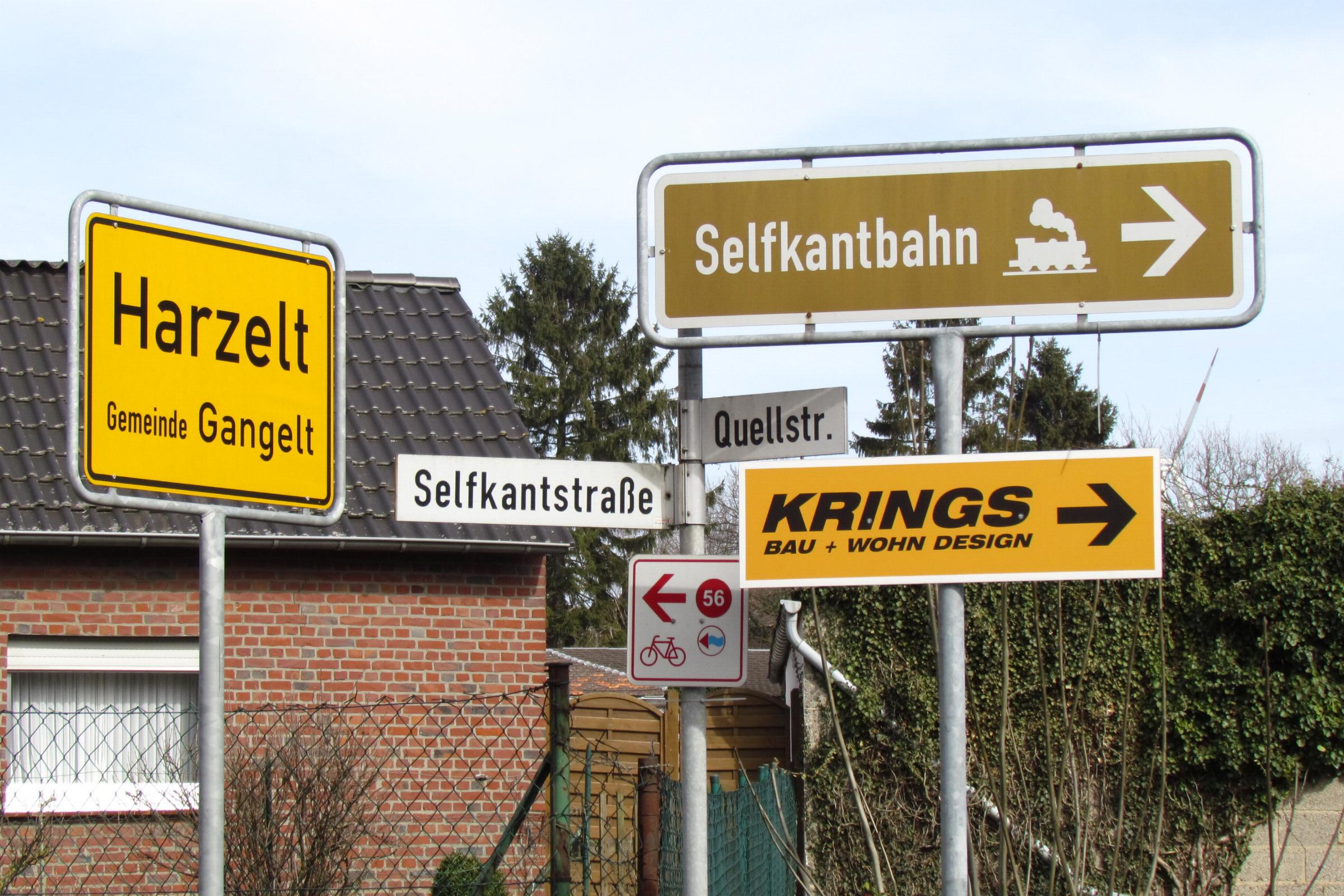 Beschilderung in Harzelt